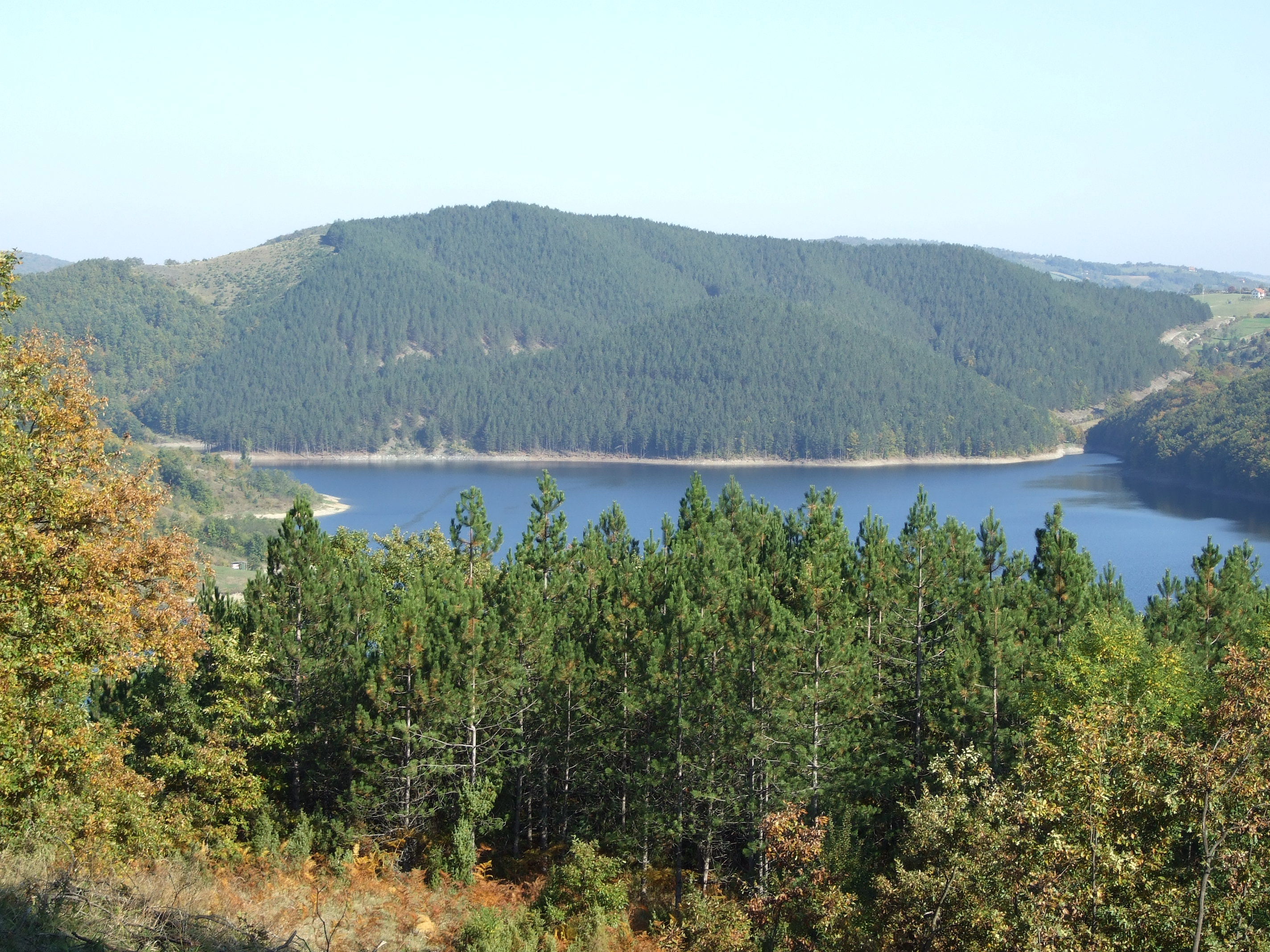 Bioska, Serbia